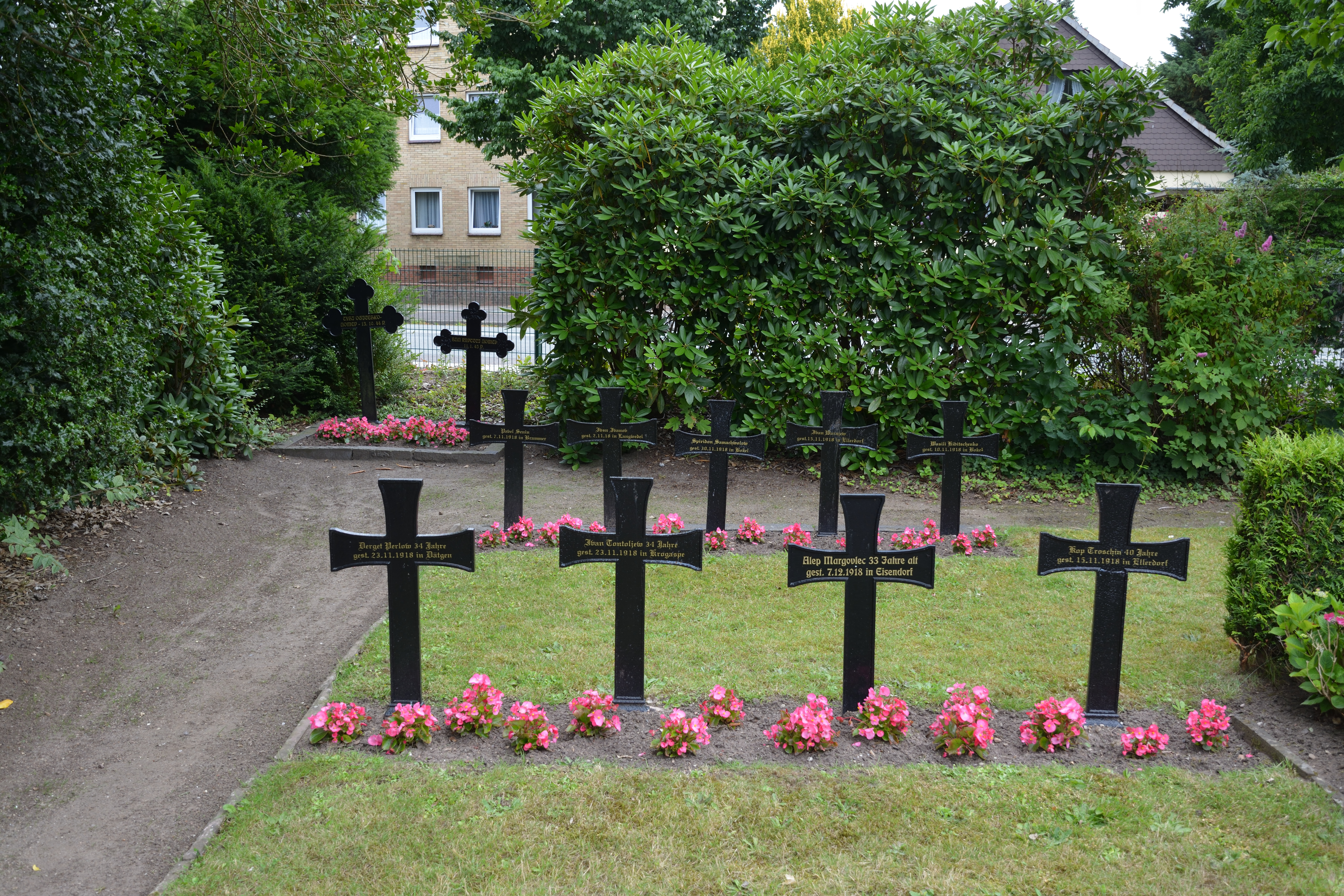 Gräber auf dem Neuen Friedhof von Nortorf